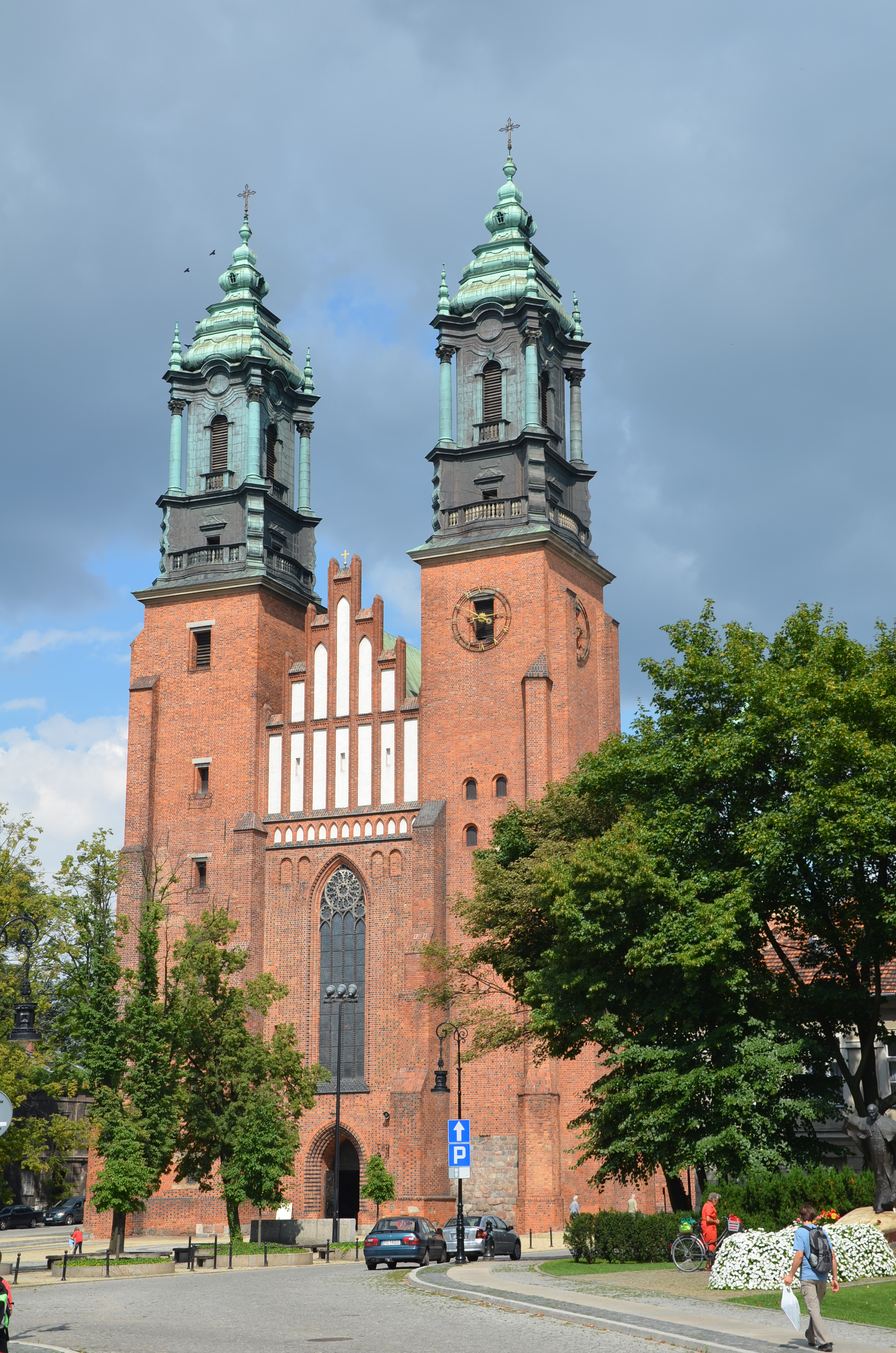 Poznań, katedra p.w. śś. Piotra i Pawła, 2 poł. XIII, XIV, XVIII, 1954-1956